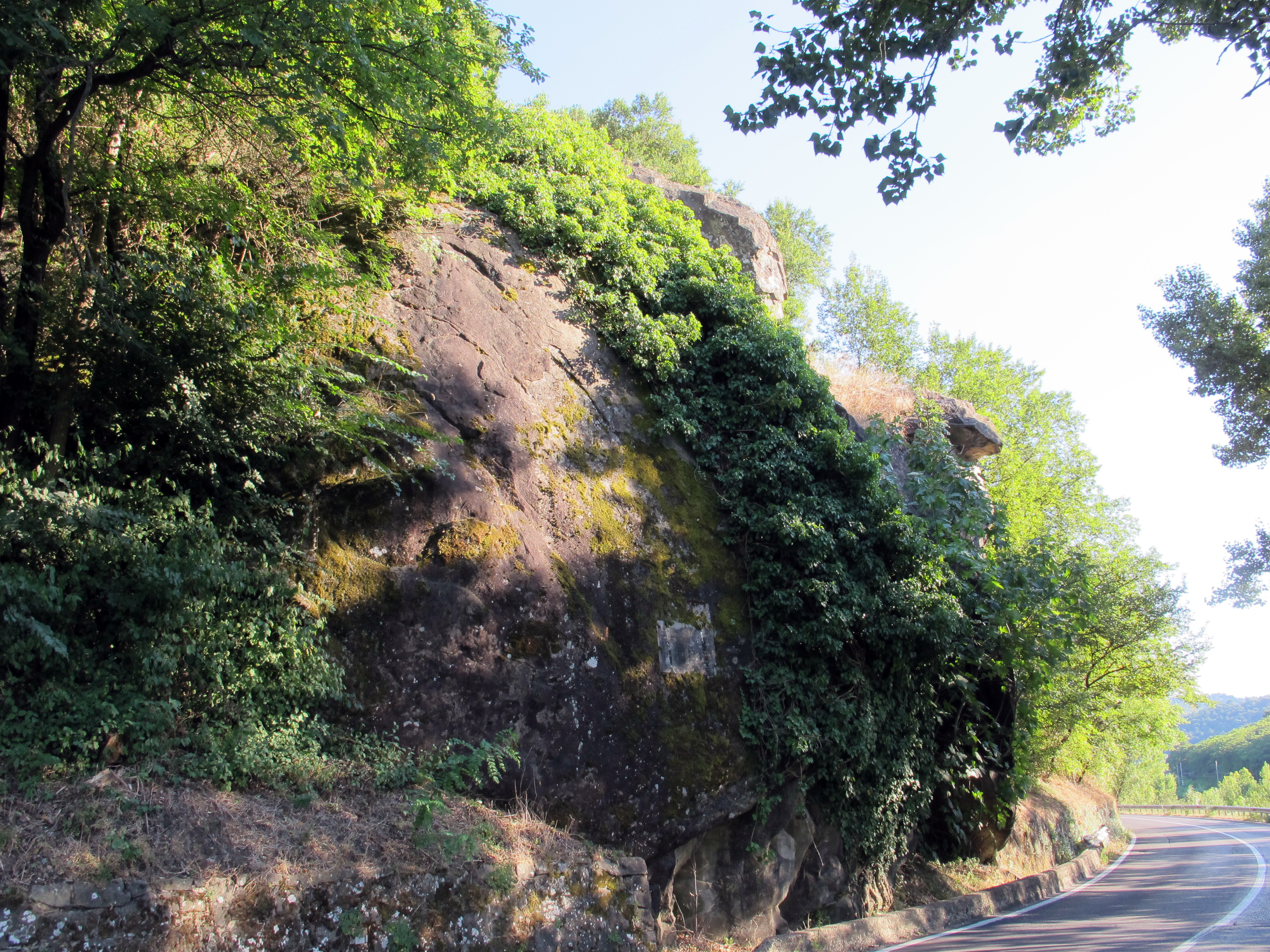 Gonfolina